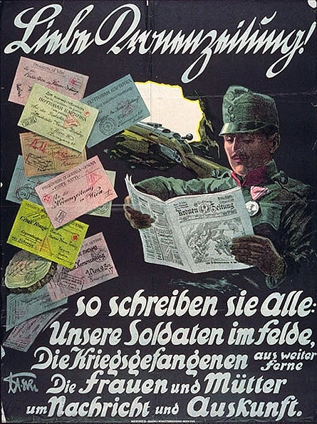 Plakat der Kronenzeitung über Leserpost im Ersten Weltkrieg (Lithographie). Transkription: Liebe Kronenzeitung! So schreiben sie alle: Unsere Soldaten im Felde, die Kriegsgefangenen aus weiter Ferne, die Frauen und Mütter um Nachricht und Auskunft.